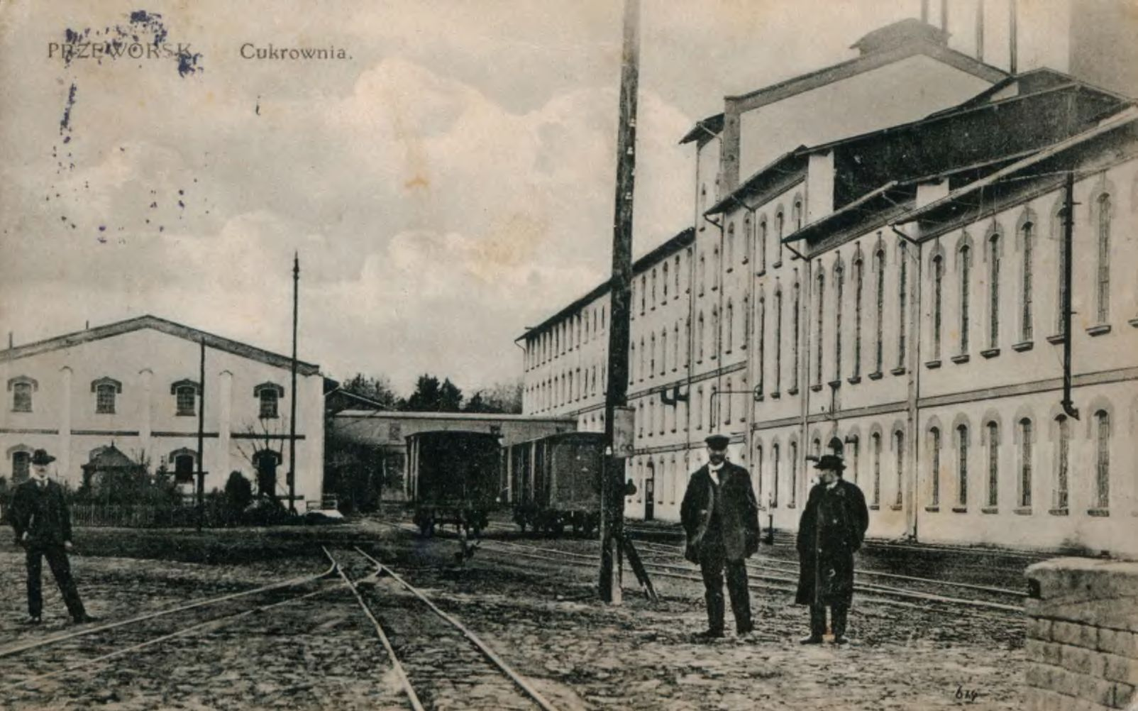 Cukrownia w Przeworsku przed 1939